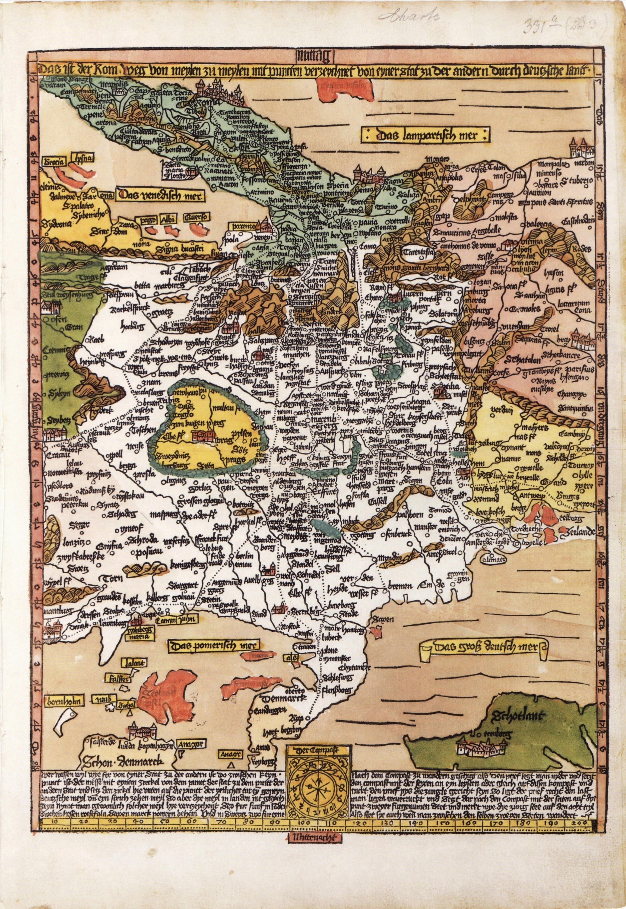 Nach Süden orientierte Straßenkarte Erhard Etzlaubs für Wallfahrten nach Rom. Anlass war das Heilige Jahr 1500 (Kolorierter Holzschnitt)